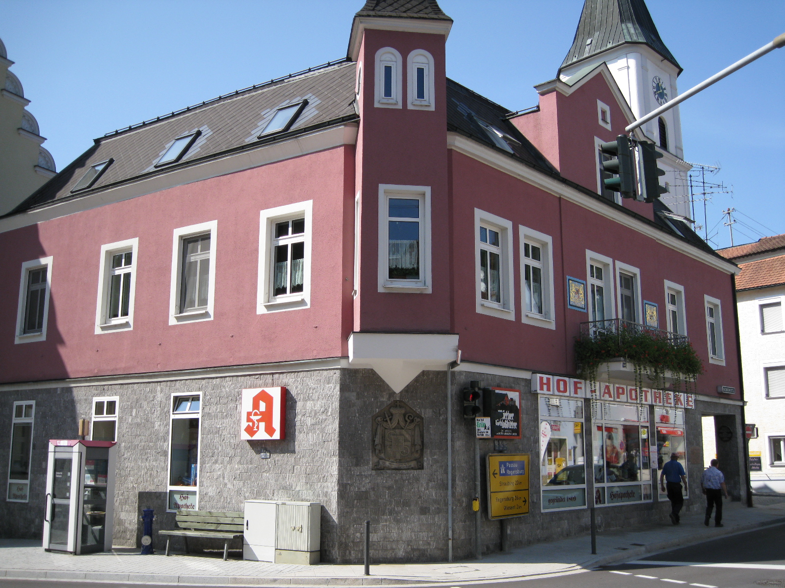 Ansicht der Hofapotheke in Wörth